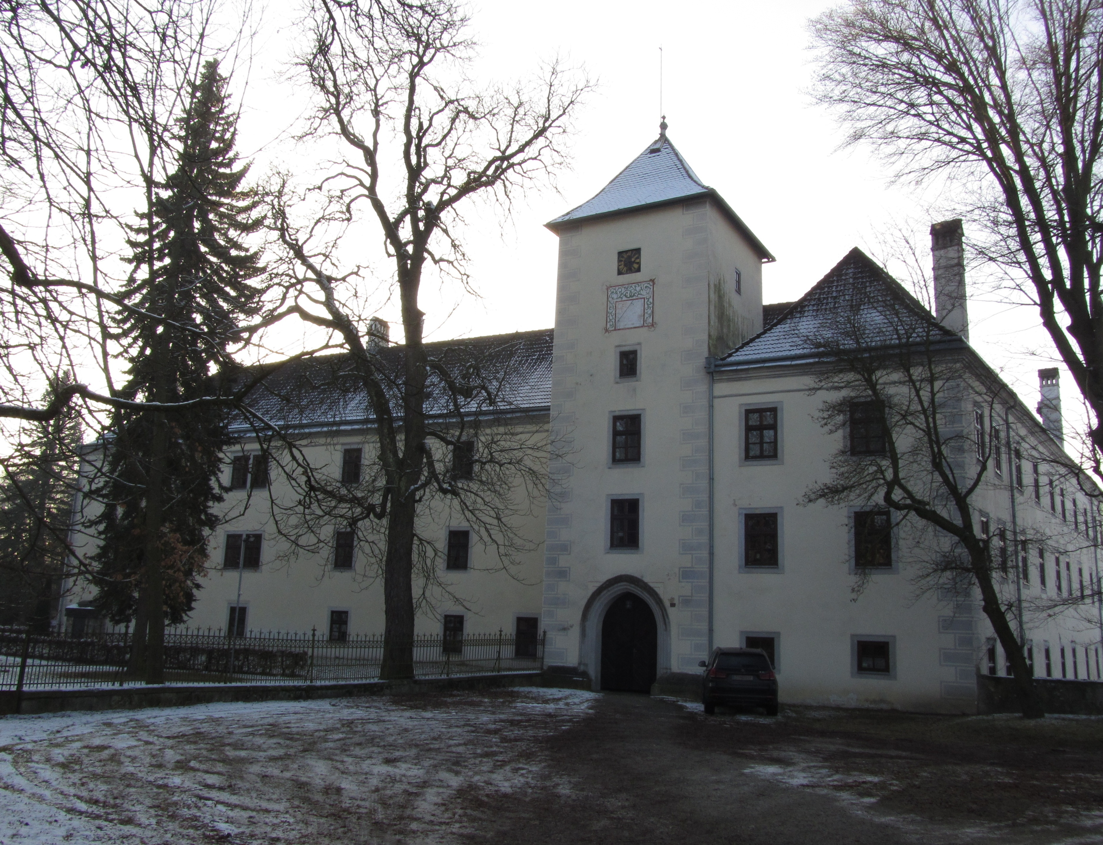 Ursprünge imum 1100, heutige Form 17. Jh